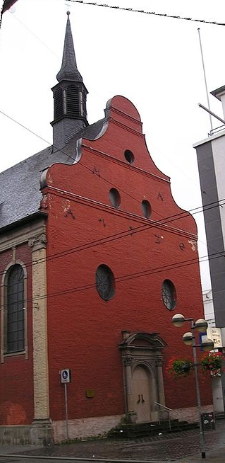 St. Sebastianus Kirche in Neuss